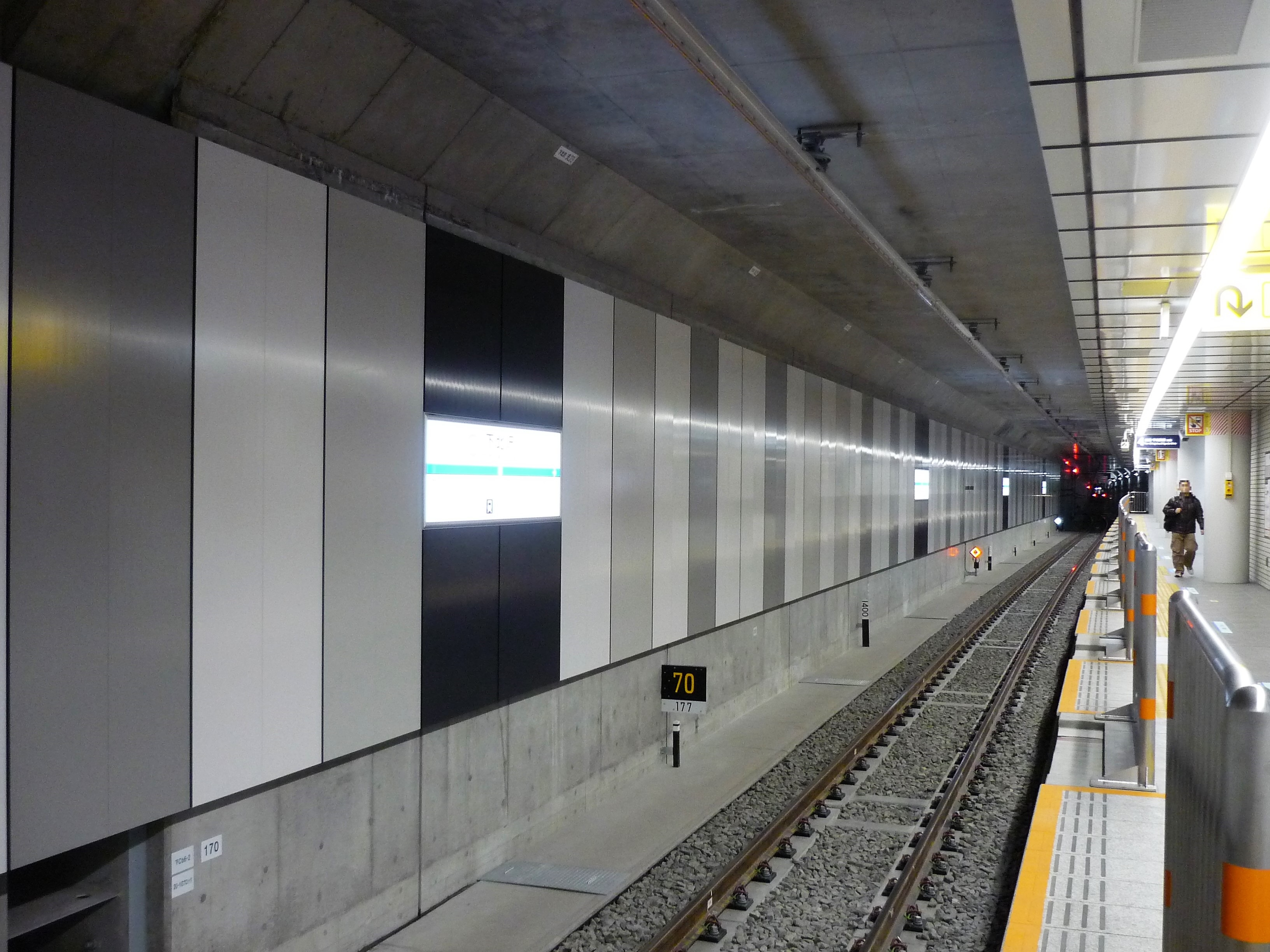 複々線化後の下北沢駅地下2階ホーム4番線（2018年3月）